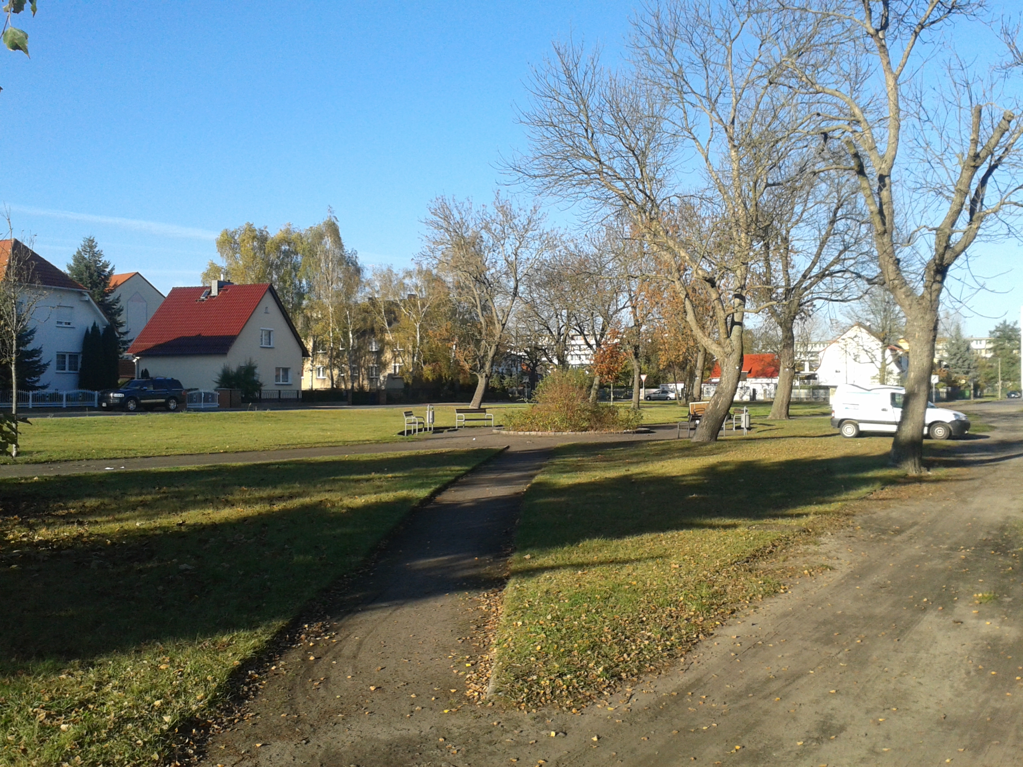 Der Platz ist eine der wenigen Grünflächen im Stadtteil. Im Hintergrund sind die Plattenbauten des Kosmonautenviertels zu erkennen.